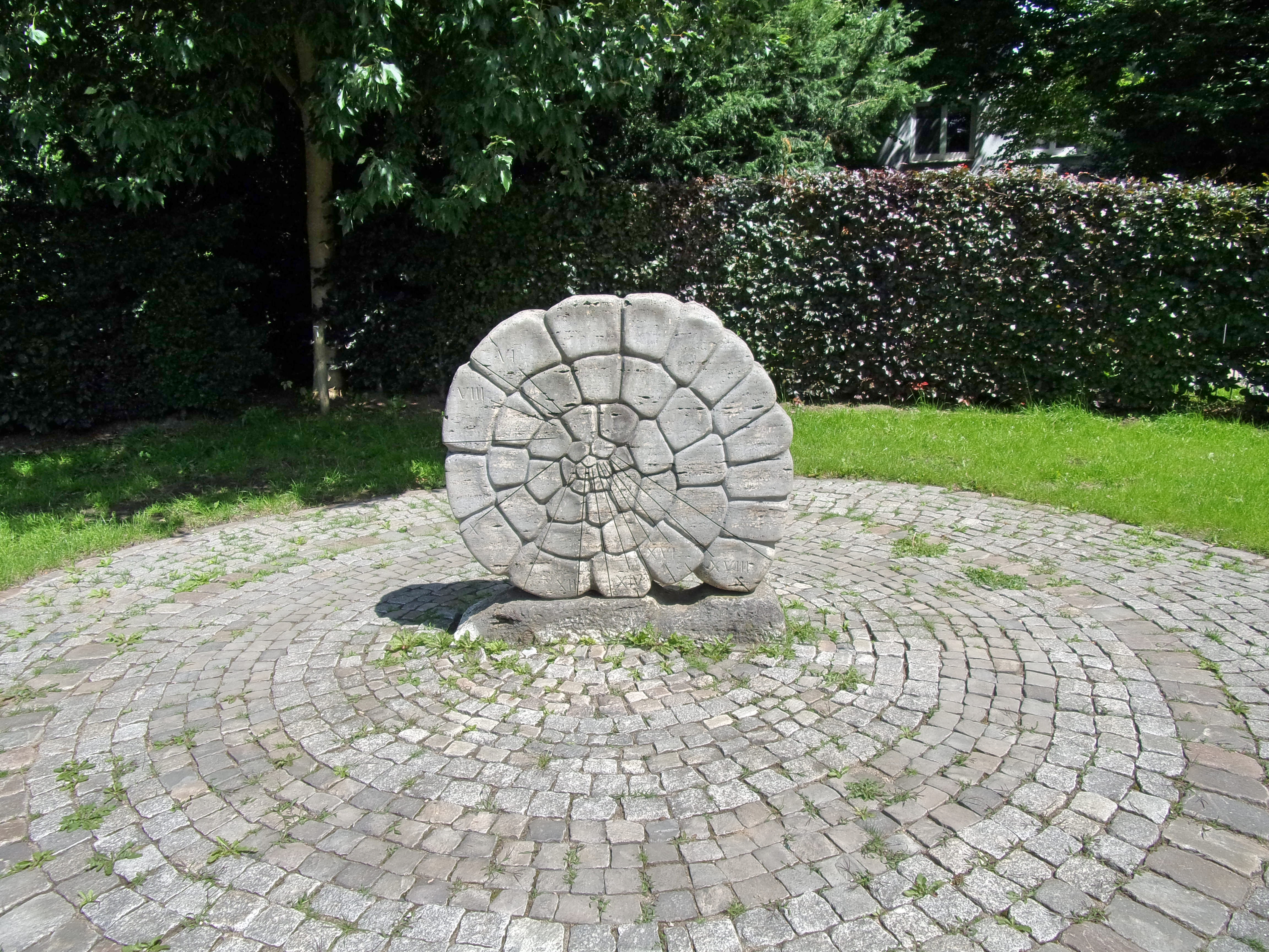 Sonnenuhr im Botanischen Sondergarten in Wandsbek.